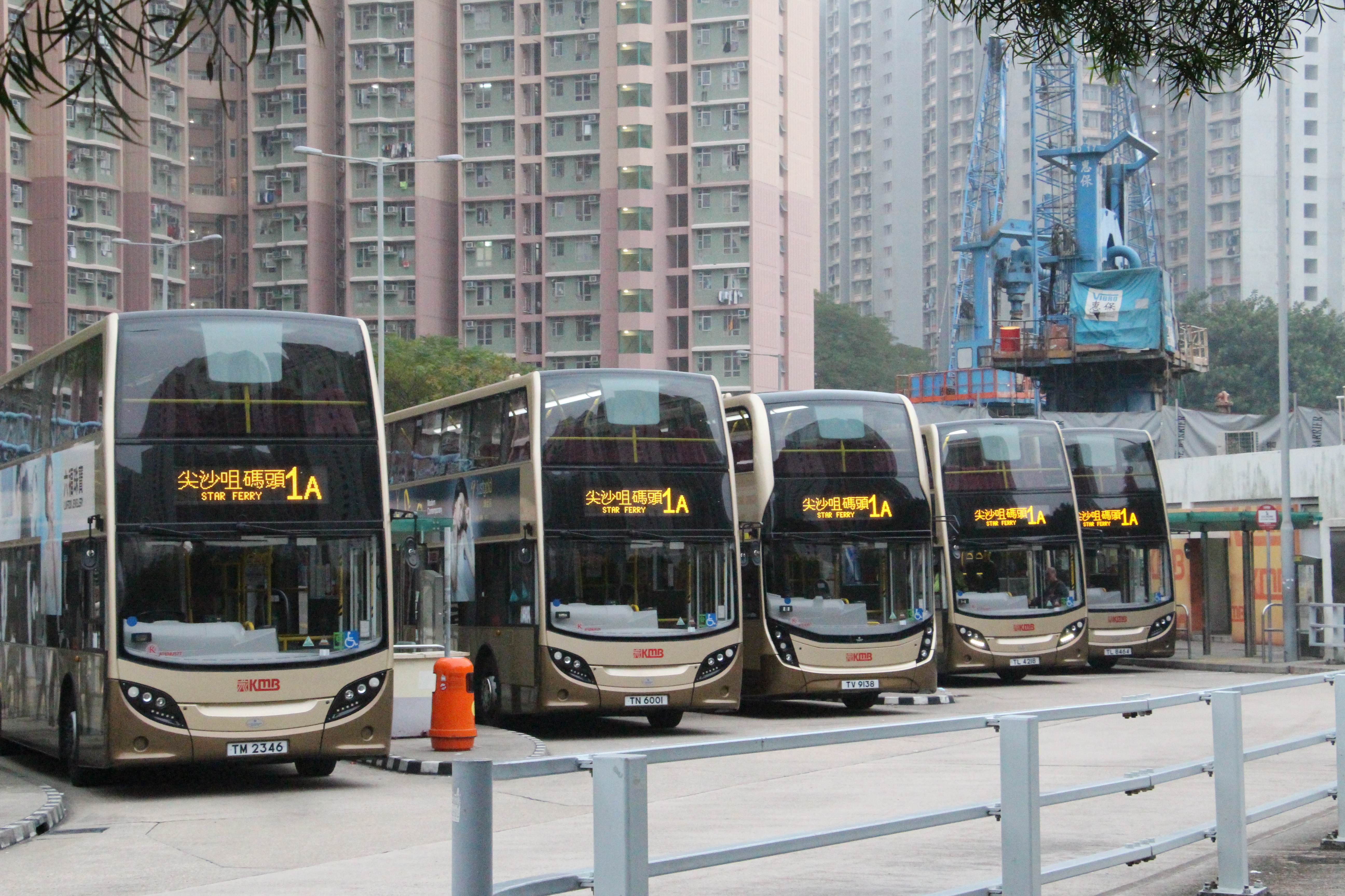 五部行走1A線之ATENU於中秀茂坪巴士總站等待開出